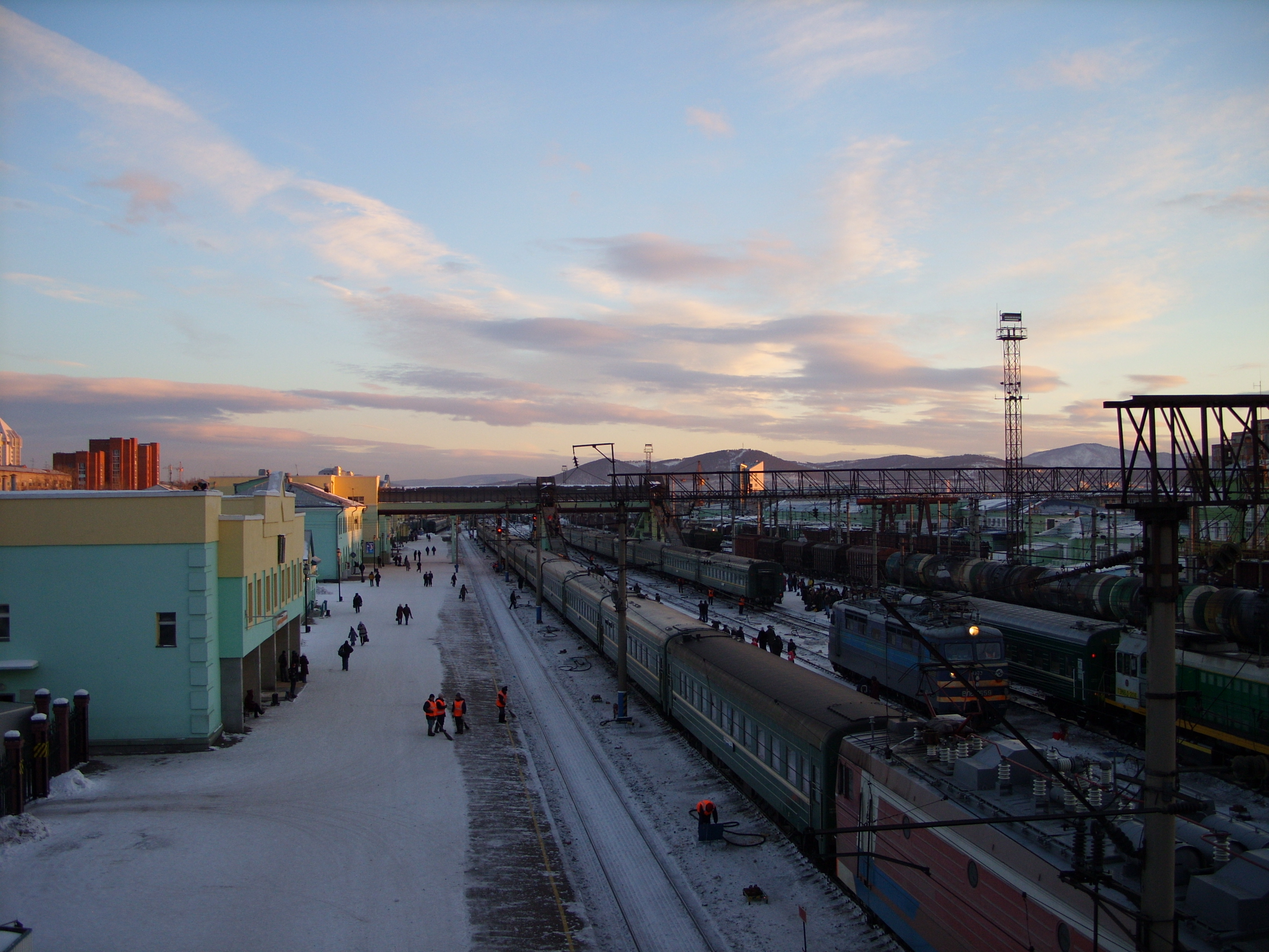 снимки декабря 2008 г.